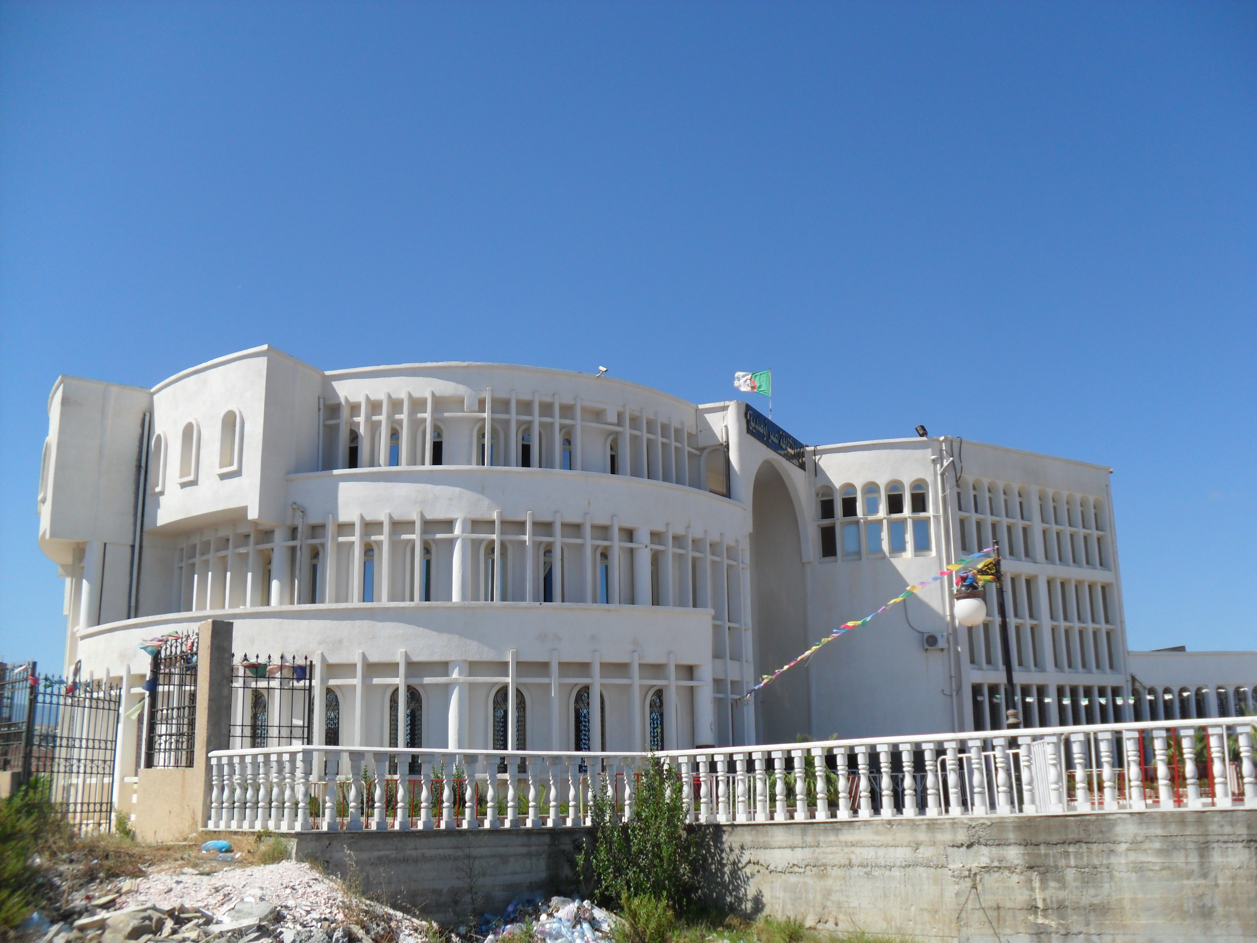 Jijel, Wilaya de Jijel (Algérie)